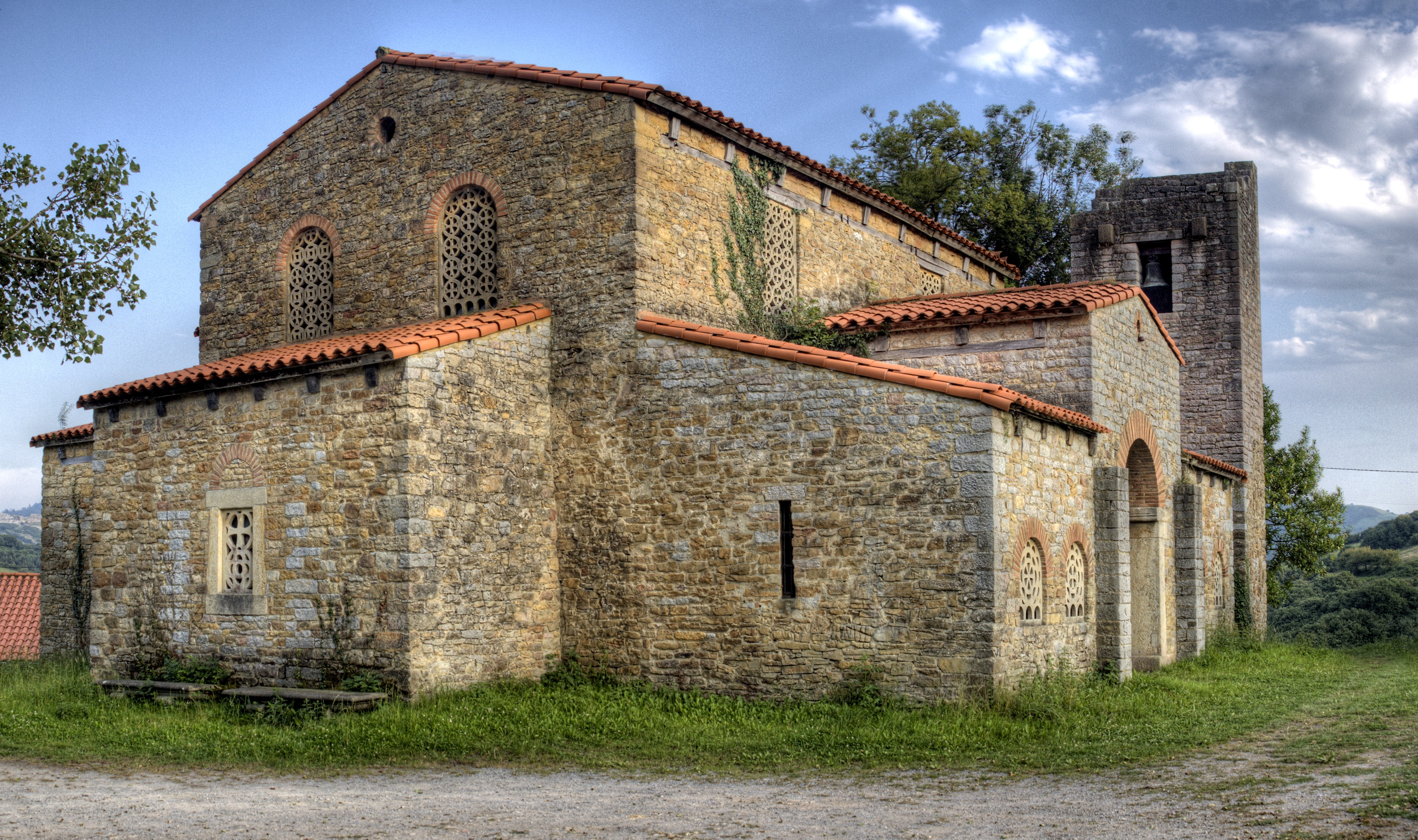 Iglesia del siglo IX, sin datos sobre la fecha exacta de su construcción.